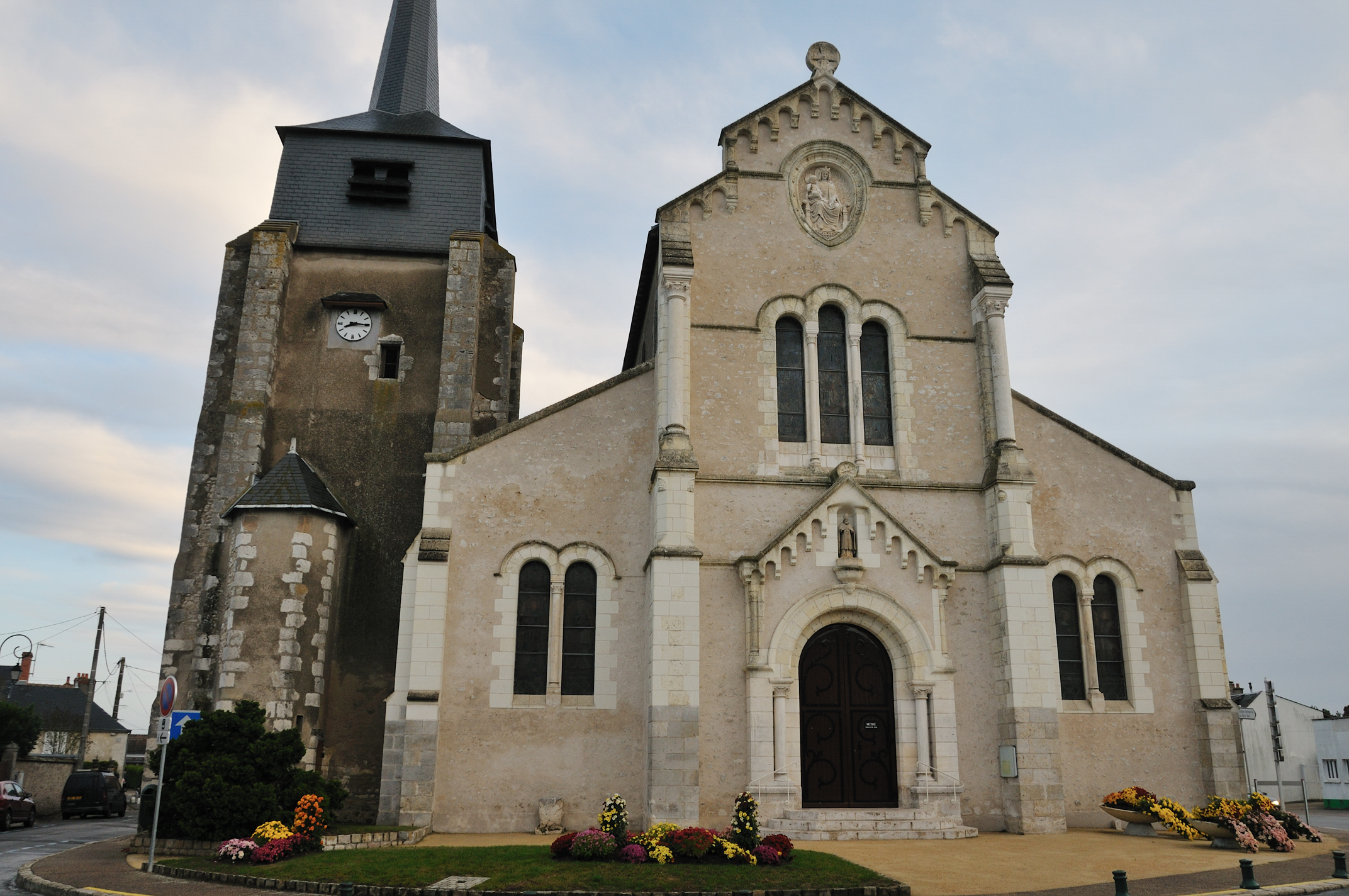 Église Saint-Aignan, Sandillon, Loiret, France